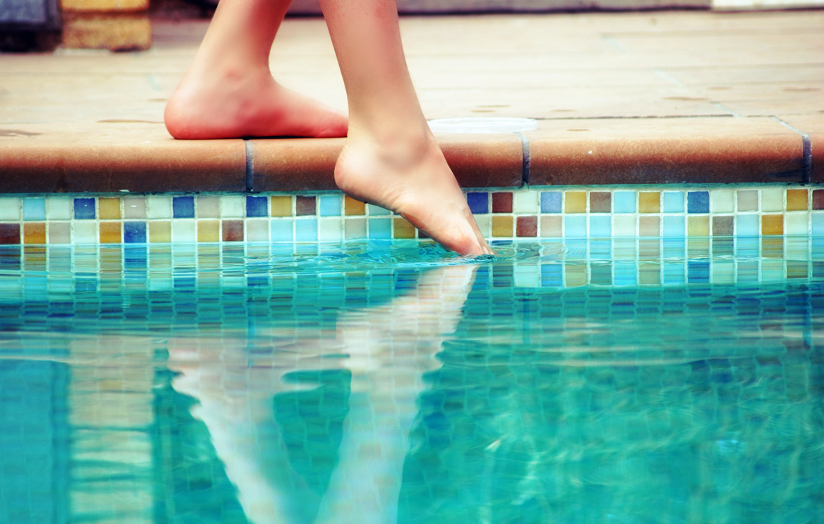 Tastant l'aigua dúna piscina.